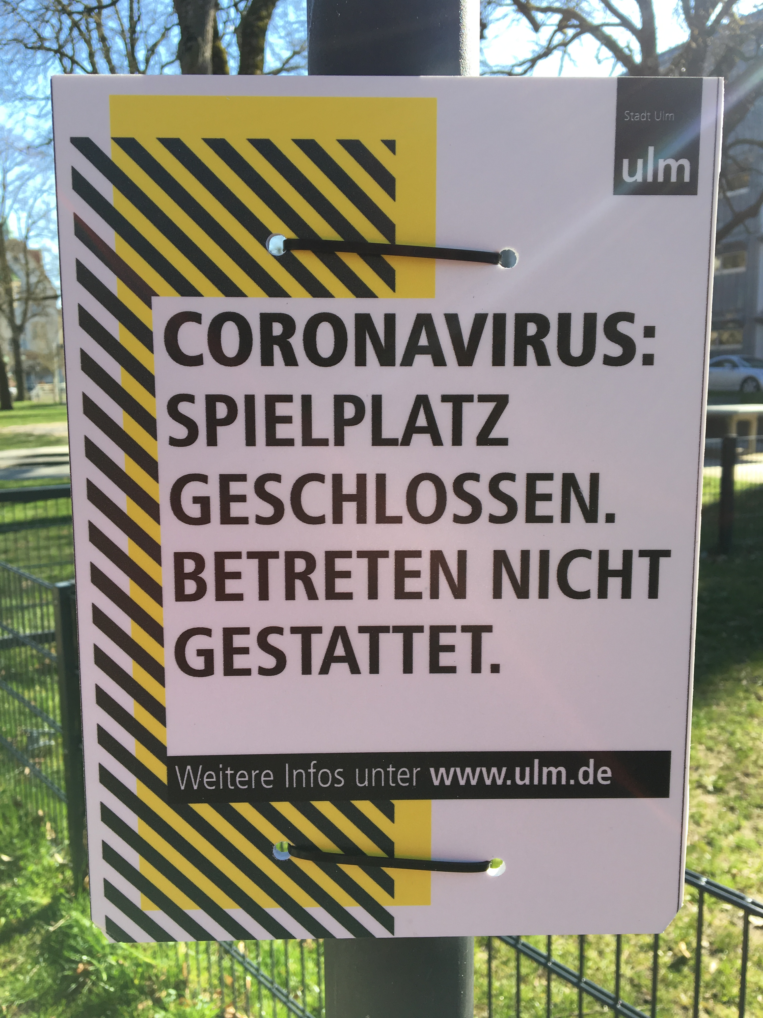 Hinweisschild der Stadt Ulm zur Schließung von Spielplätzen. Hier: Östlich des Alten Friedhof an der Frauenstraße